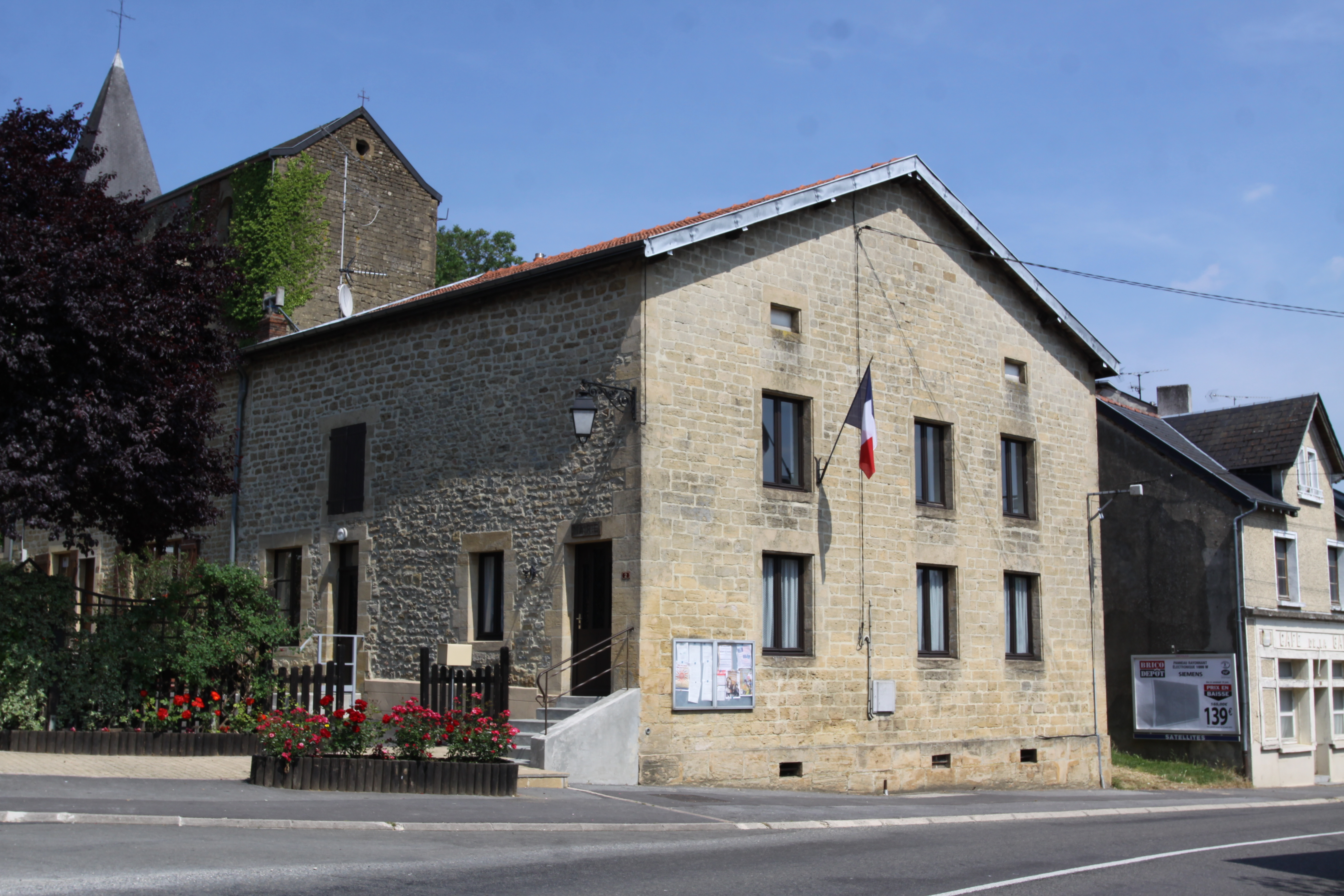 Village Ardennais